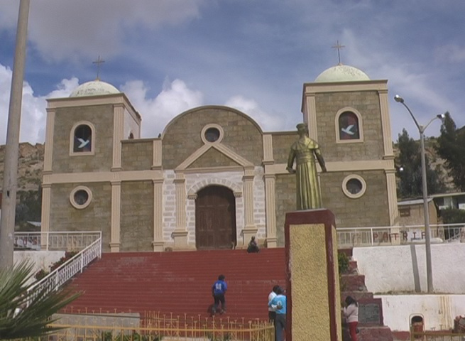 Iglesia del distrito de Estique.